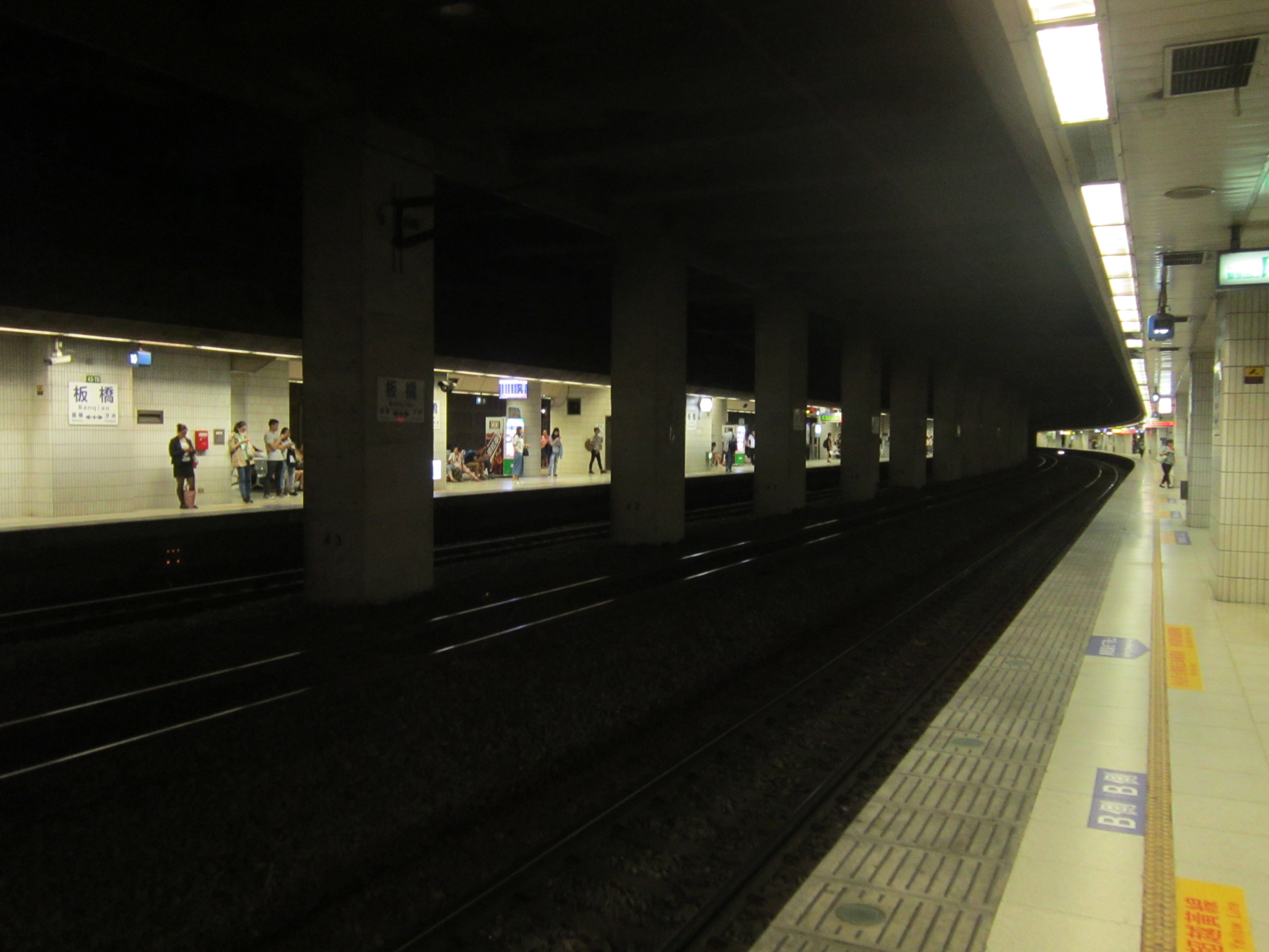 位於地下層的台鐵板橋車站月台及路軌